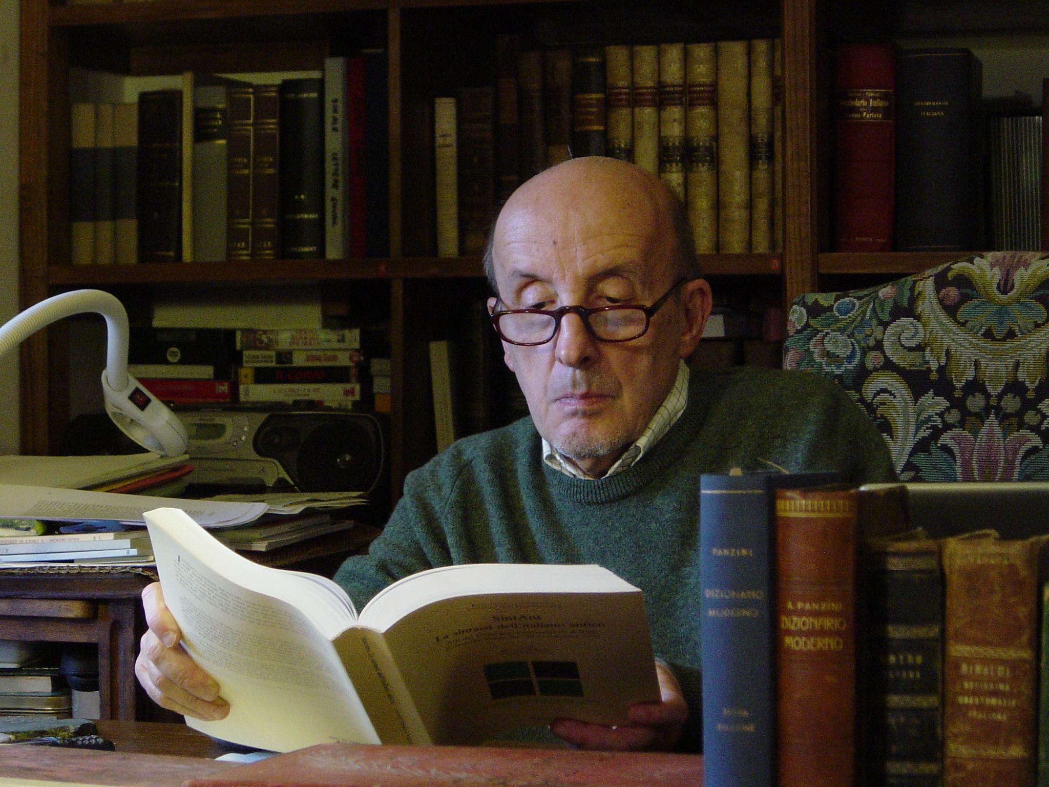 Maurizio Dardano - Linguista italiano